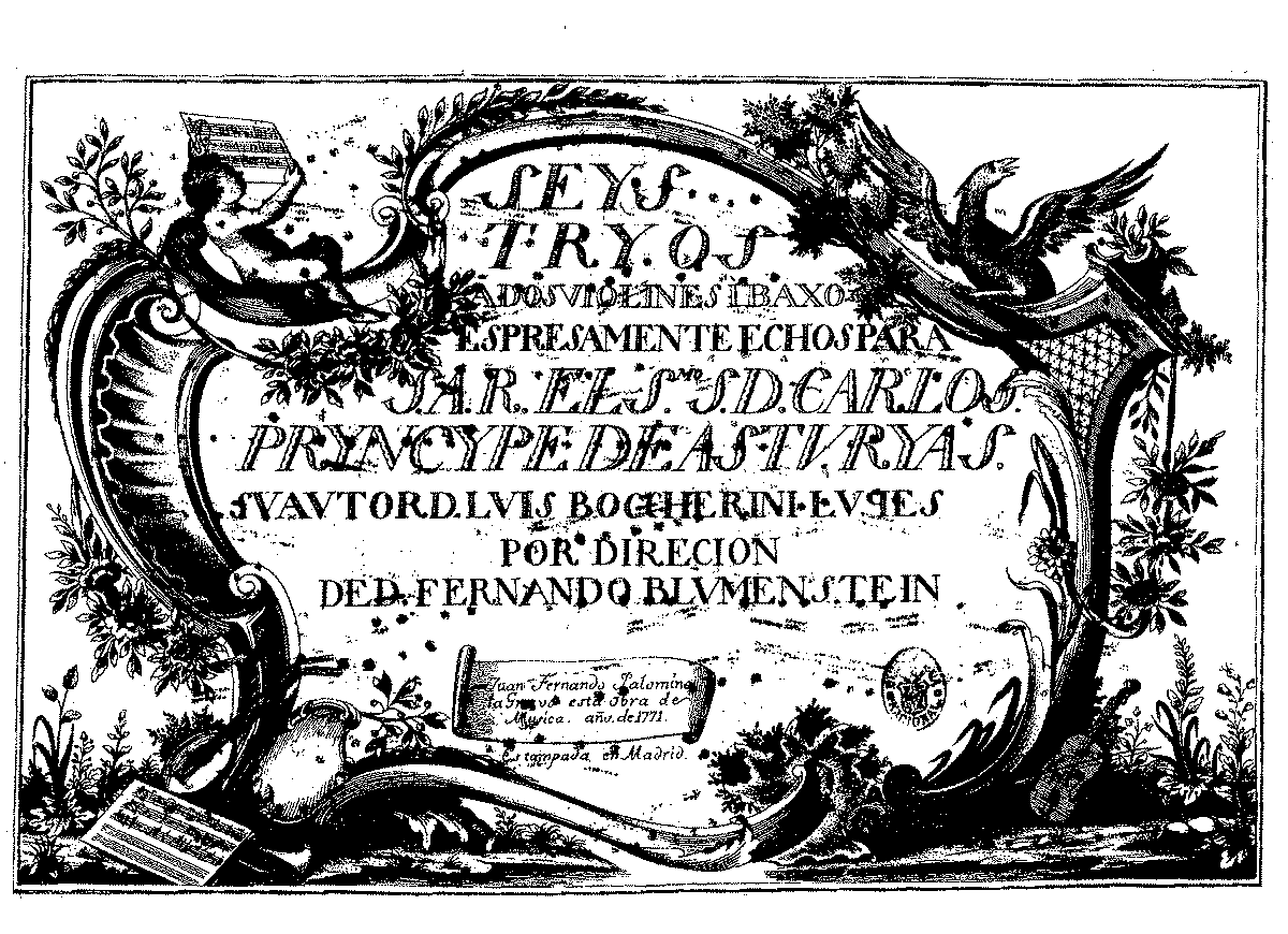 Trios opus 6 de Boccherini édition espagnole de Fernando Palomina (1770).